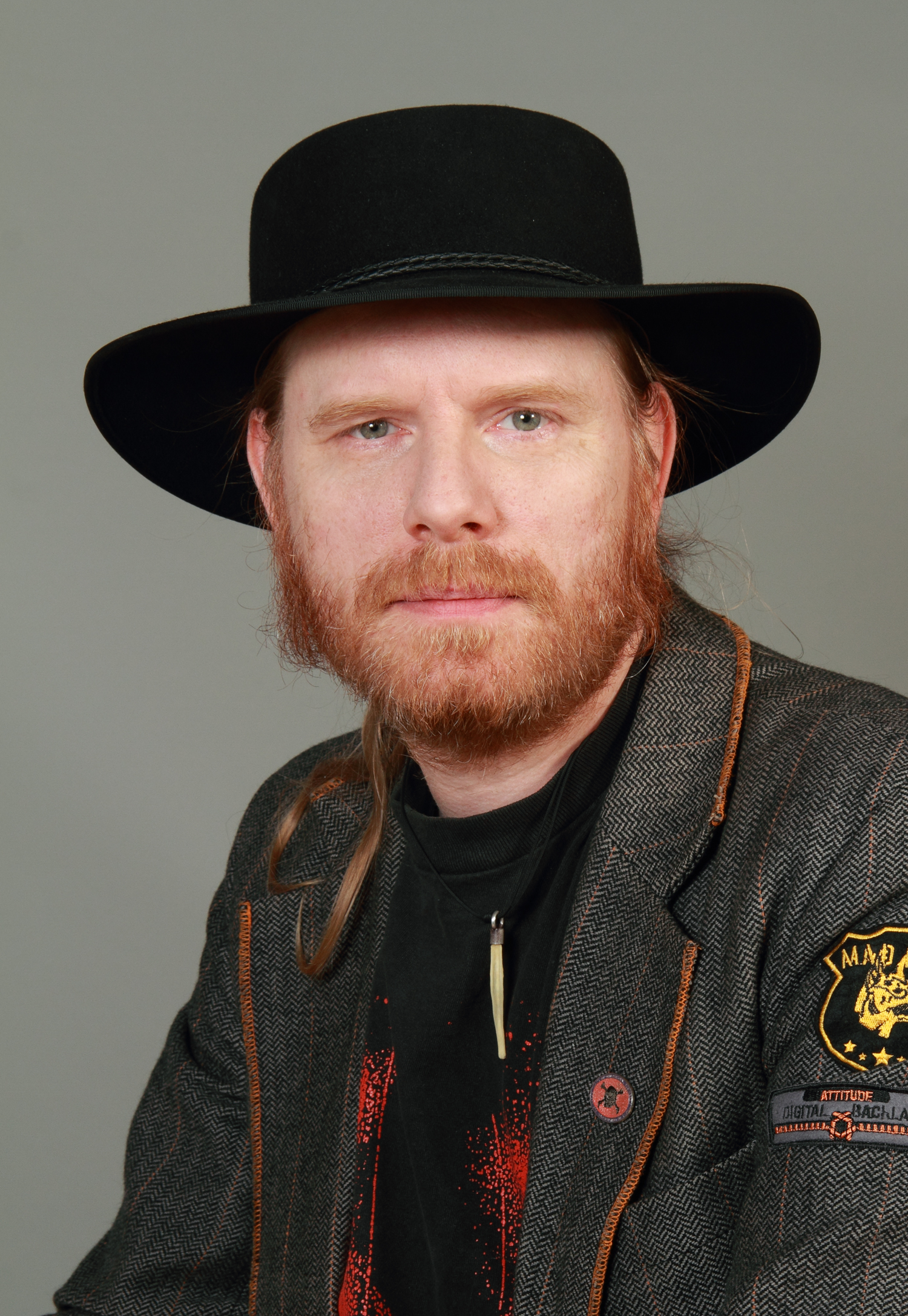 LandtagsabgeordneteR NRW